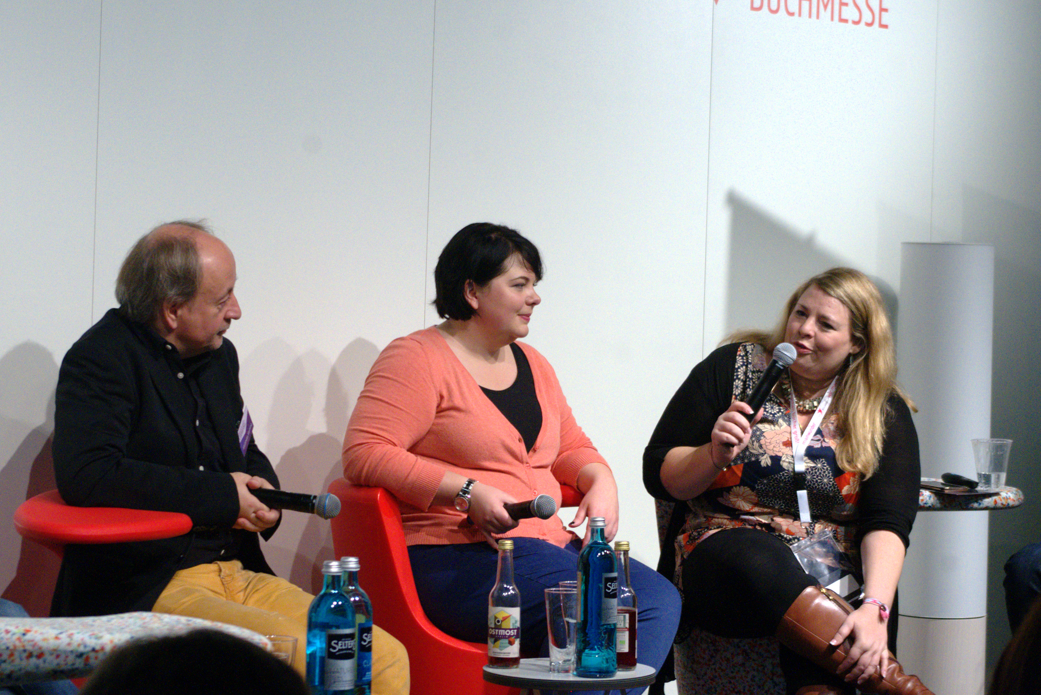 Frankfurter Buchmesse 2017. Diskussion über Selfpublishing im Orbanism Space mit Matthias Matting und Poppy Anderson